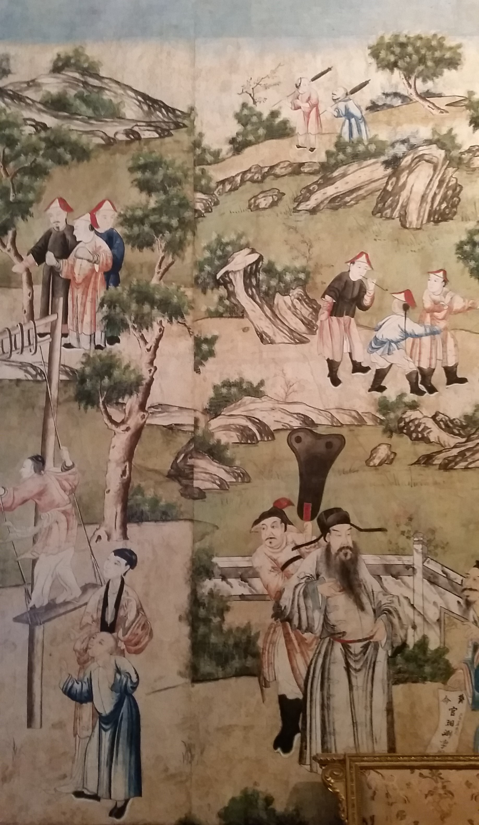 Tappezzeria di carta dipinta a tempera, importata dalla Cina meridionale e databile alla seconda metà del XVIII secolo, con scene di vita cinese in uno dei "gabinetti cinesi" della Palazzina di Stupinigi, Stupinigi, frazione di Nichelino, Piemonte, Italia.